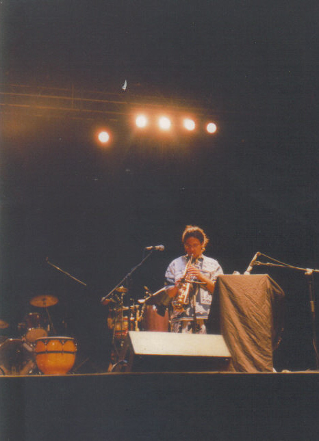 Nicolas Vatomanga saxophone solo